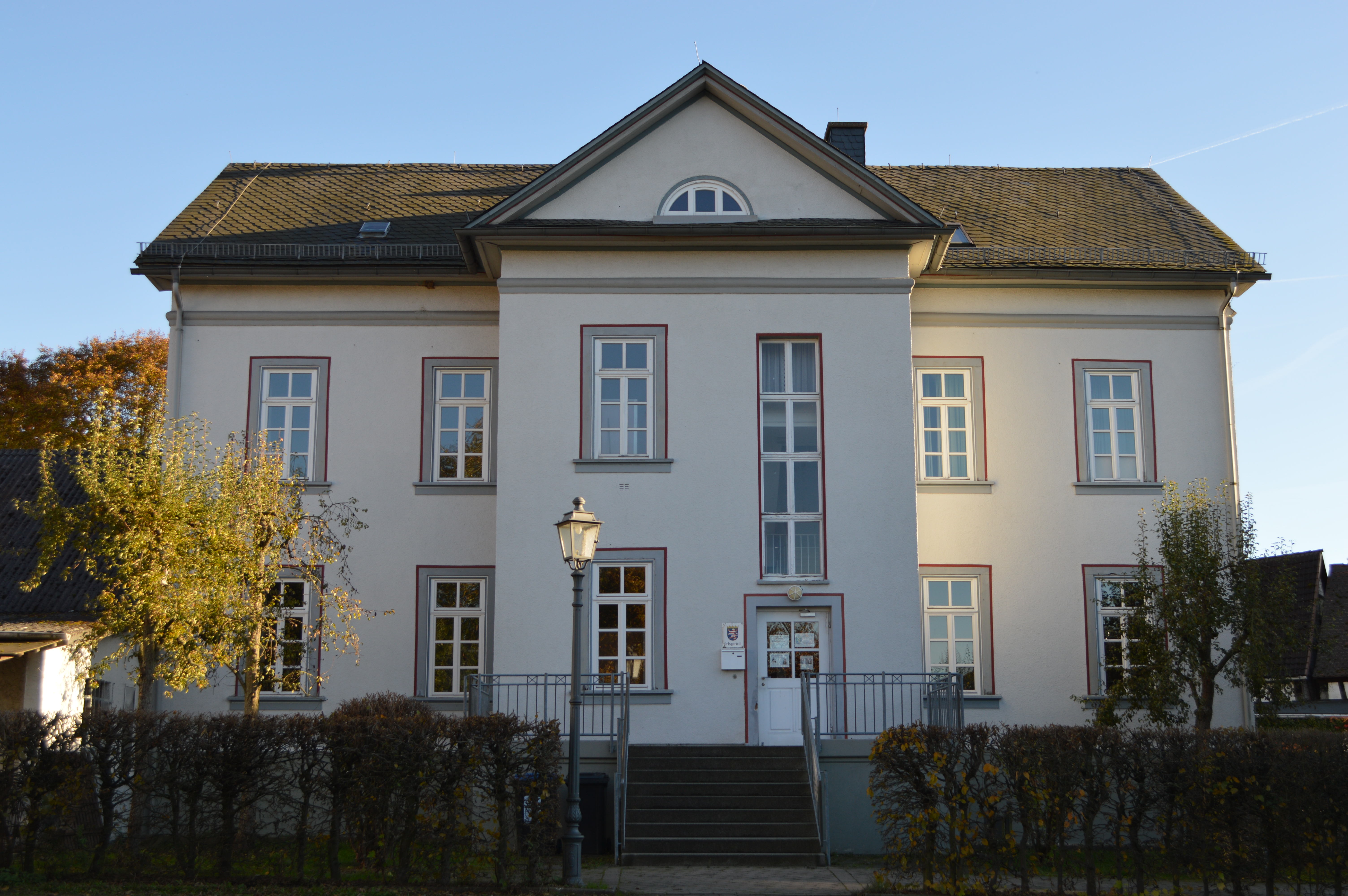 Pfaffenwiesbach Lindenstraße 5 Herbst 2016